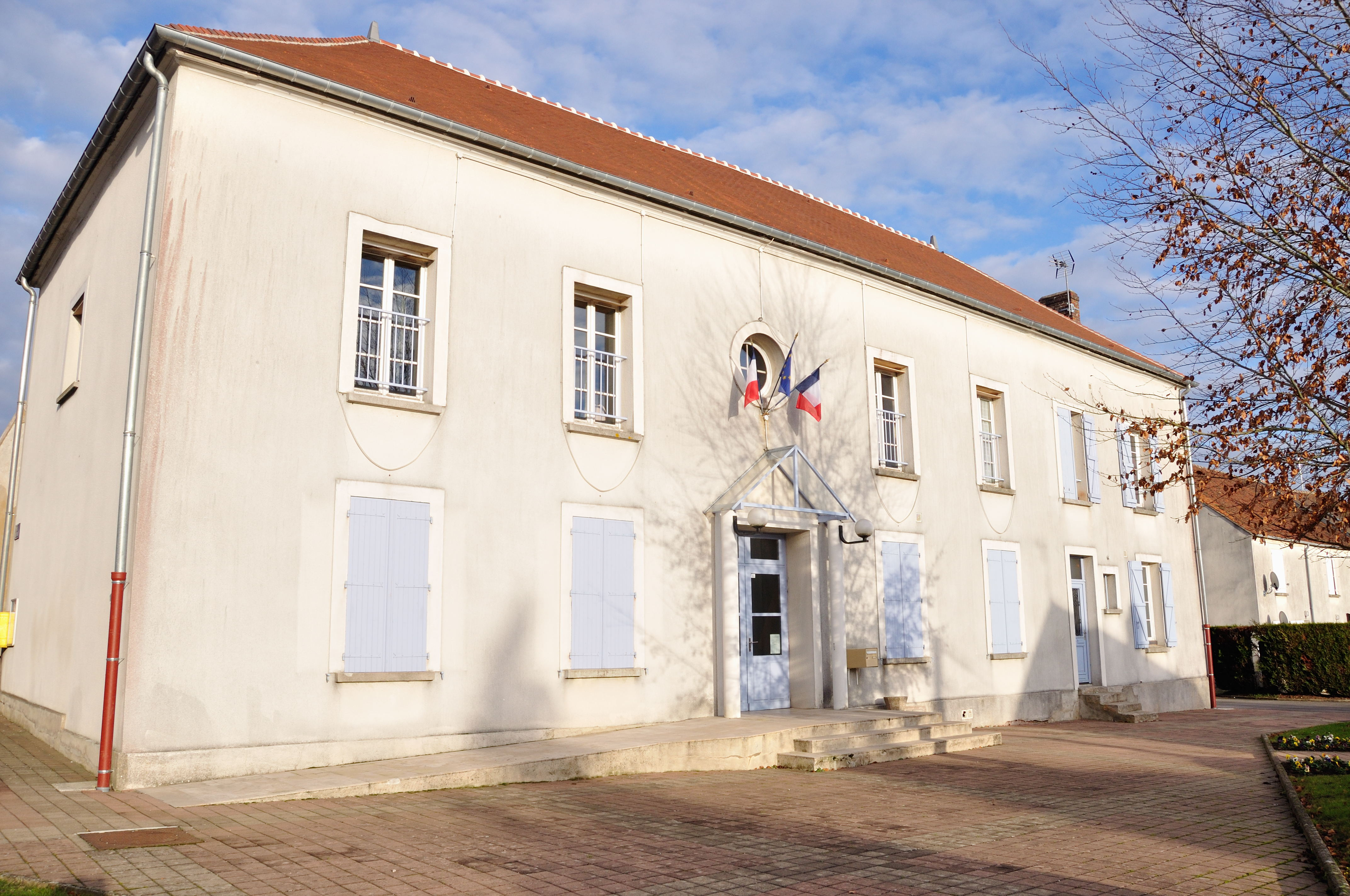 Mairie de Chailly-en-Brie. (département de la Seine-et-Marne, région Île-de-France).